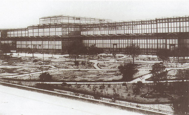 München, der 1853/54 erbaute Glaspalast